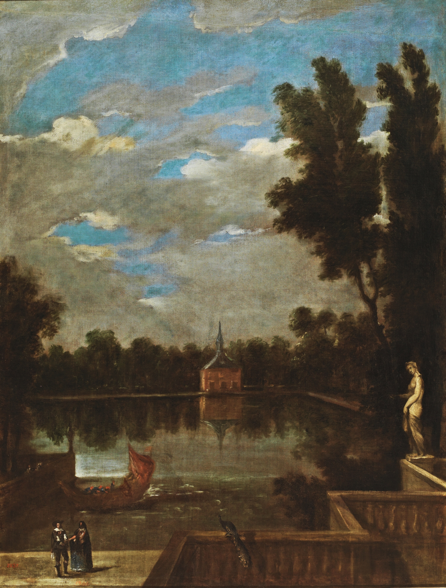 Un estanque del Buen Retirotitle QS:P1476,es:"Un estanque del Buen Retiro" label QS:Les,"Un estanque del Buen Retiro"